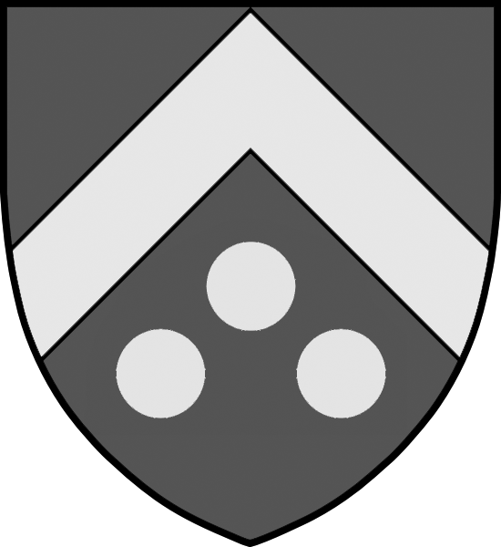 Vapensköld med sparre över tre kulor